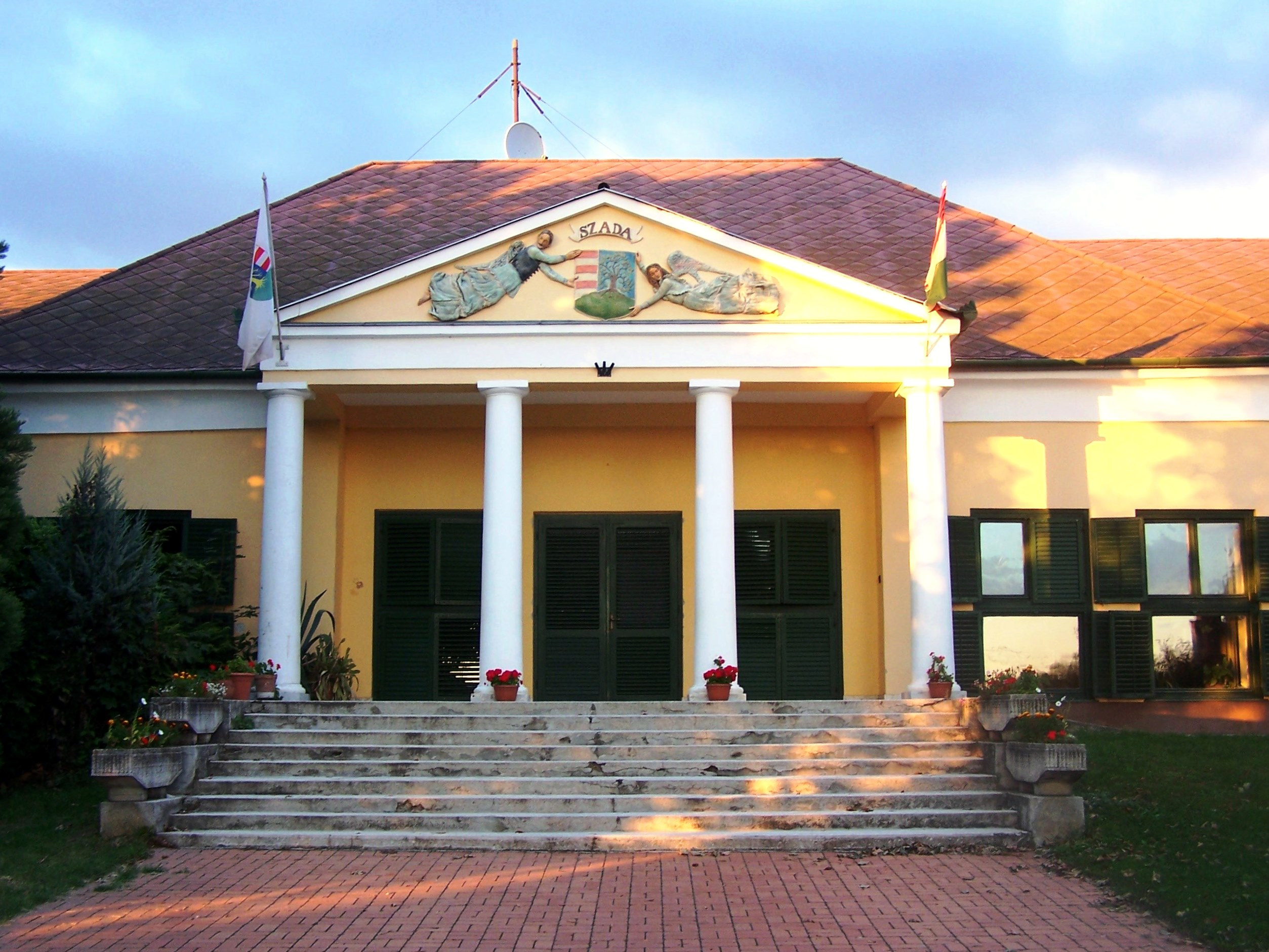 Grassalkovich-Pejacsevich-kúria (Szada, Dózsa György út 63.) This is a photo of a monument in Hungary, Identifier: 7318